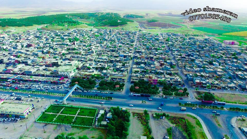 کوردی: زەڕایەن